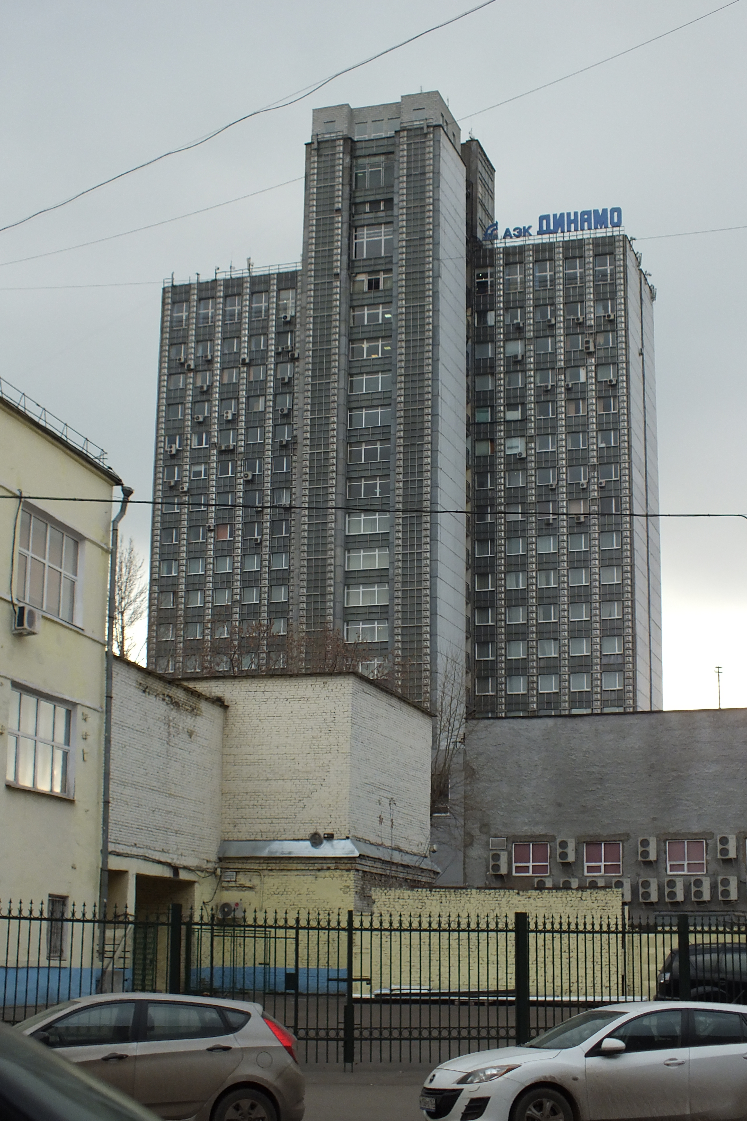 Многоэтажное здание АЭК «Динамо» на улице Мастеркова около метро «Автозаводская»